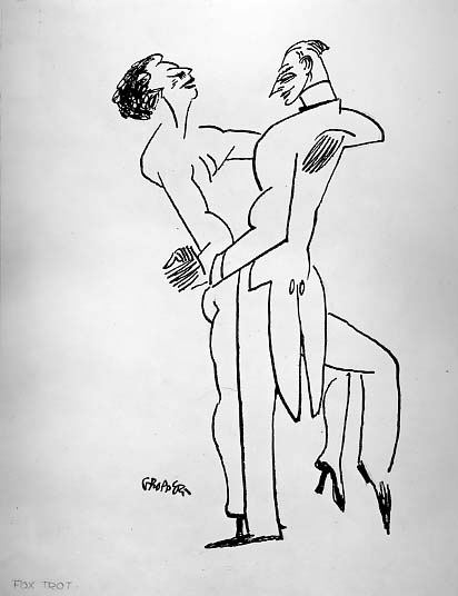 Drawing; Drawings